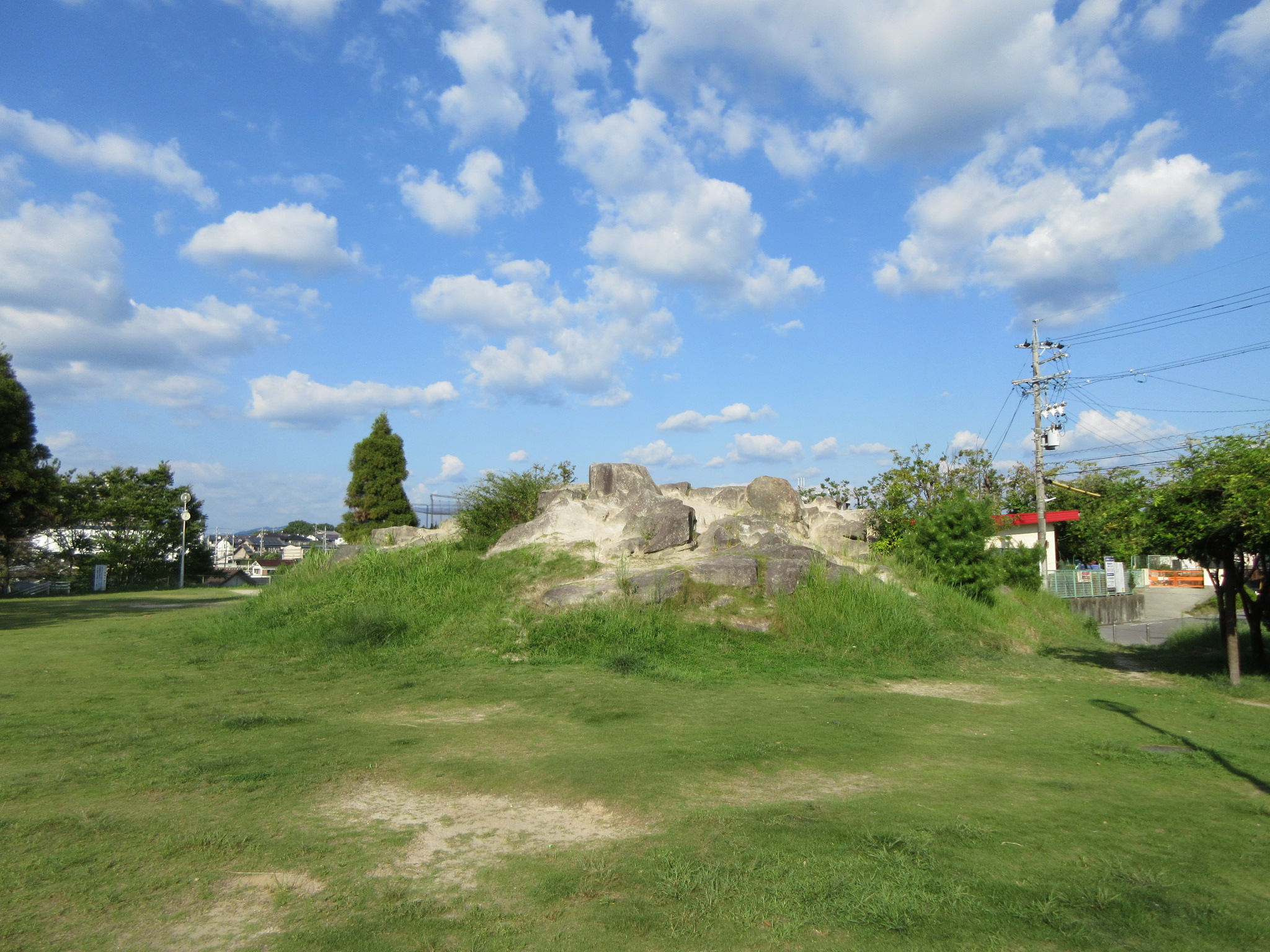 赤山公園（岡崎市井田町）